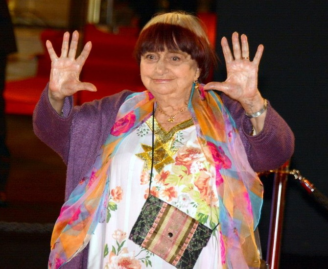 Agnès Varda à la cérémonie des César